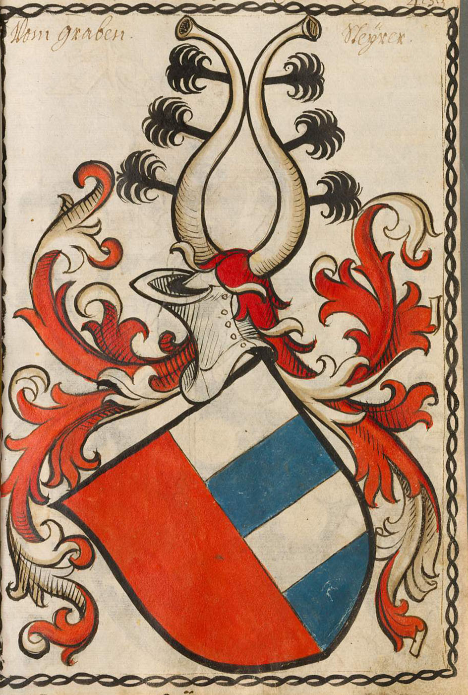 Scheibler'sches Wappenbuch , älterer Teil; Seite 433 Vom Graben Steyrer